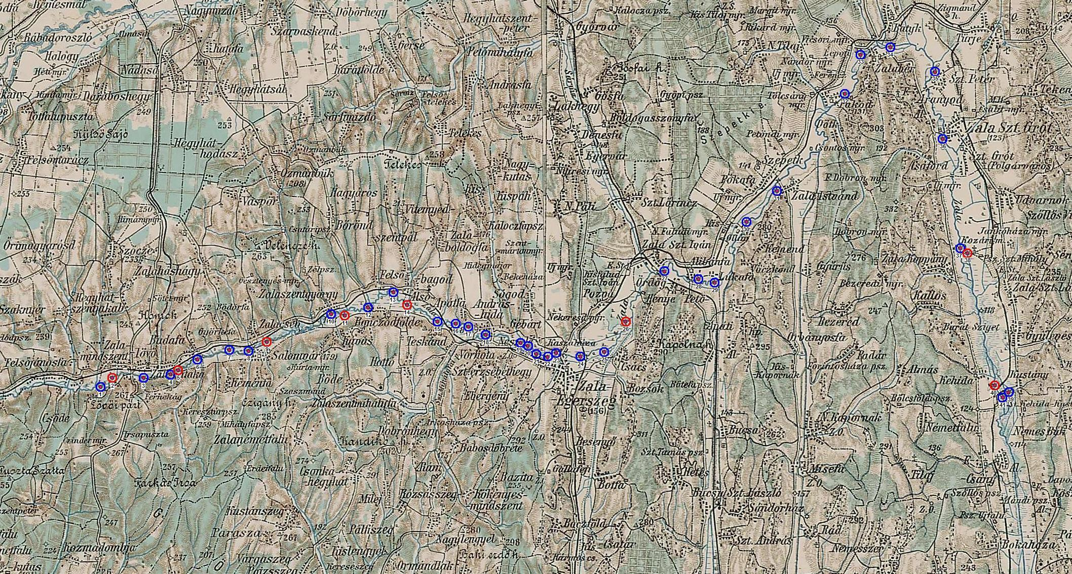 Zalai malmok - XIX. század vége